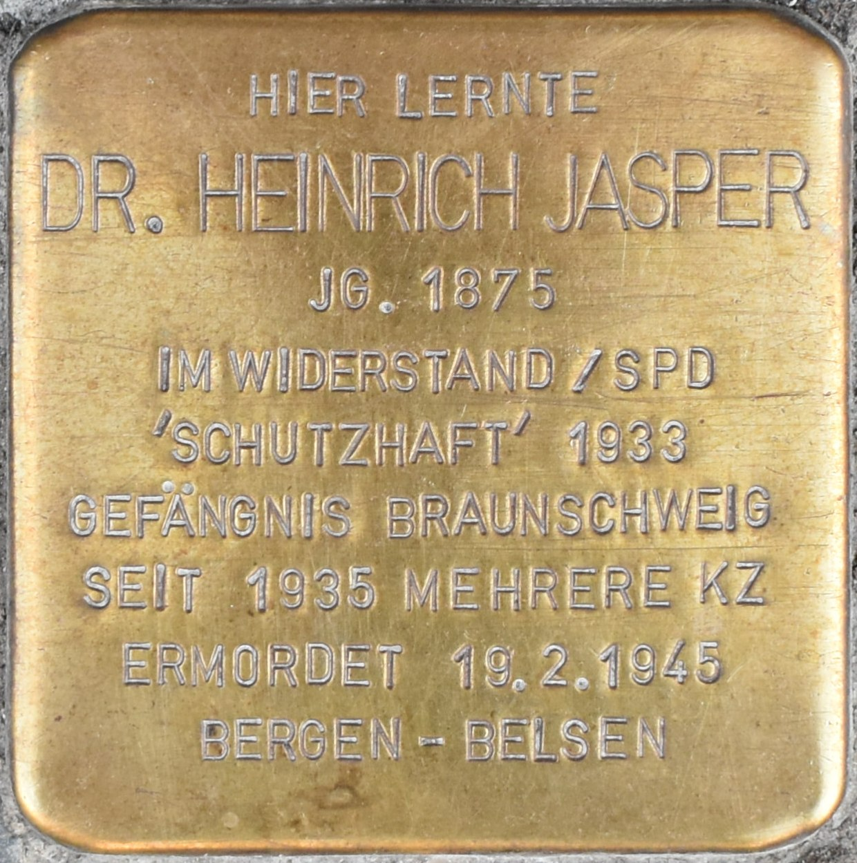 Braunschweig Leonhardstraße 63 Stolperstein Dr. Heinrich Jasper